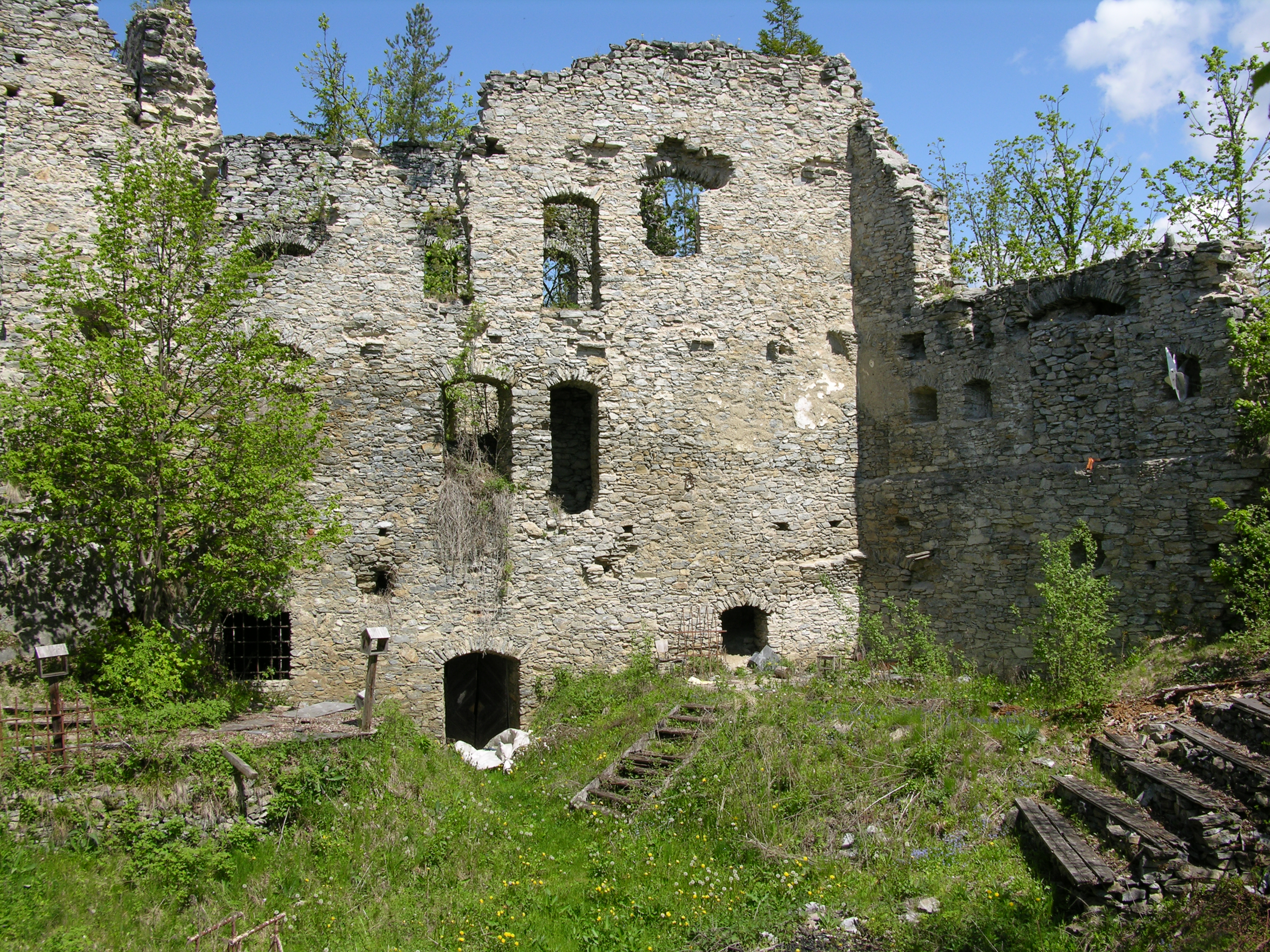 Innenhof Waisenberg